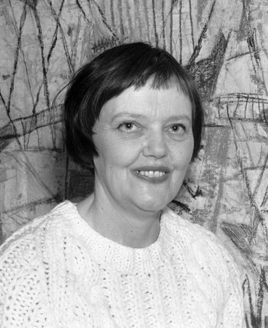 Synnøve Anker Aurdal var en norsk tekstilkunstner.